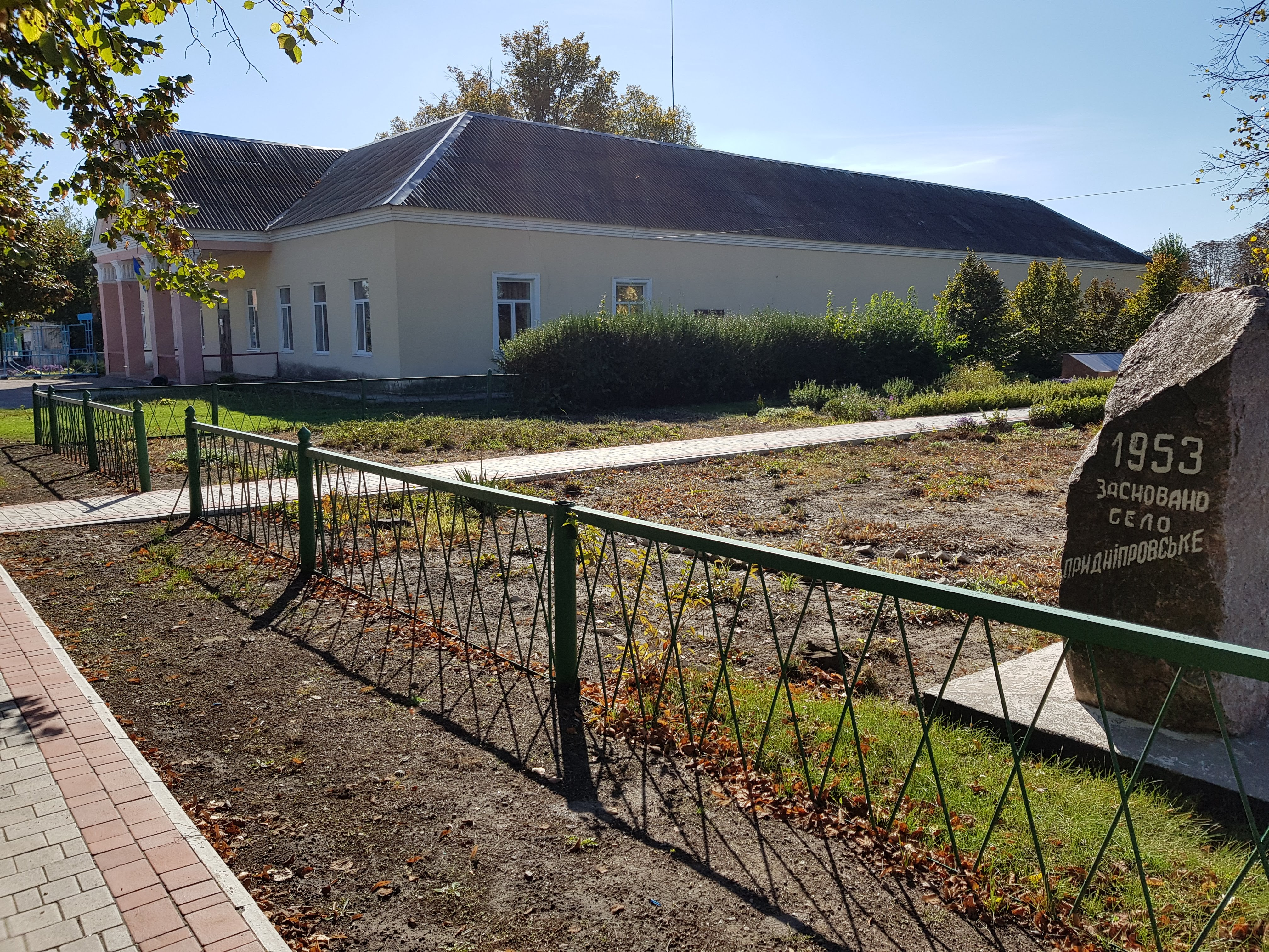 Будинок культури та пам'ятний знак встановлений на честь ювілея заснування села